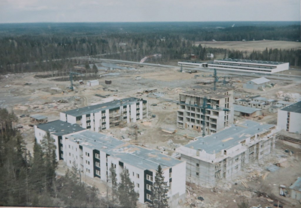 Fotografi taget från vattentornet i Umeå. Mariehemsvägen 33 med Pharmacia (nuvarande GE Health Care) på andra sidan vägen.